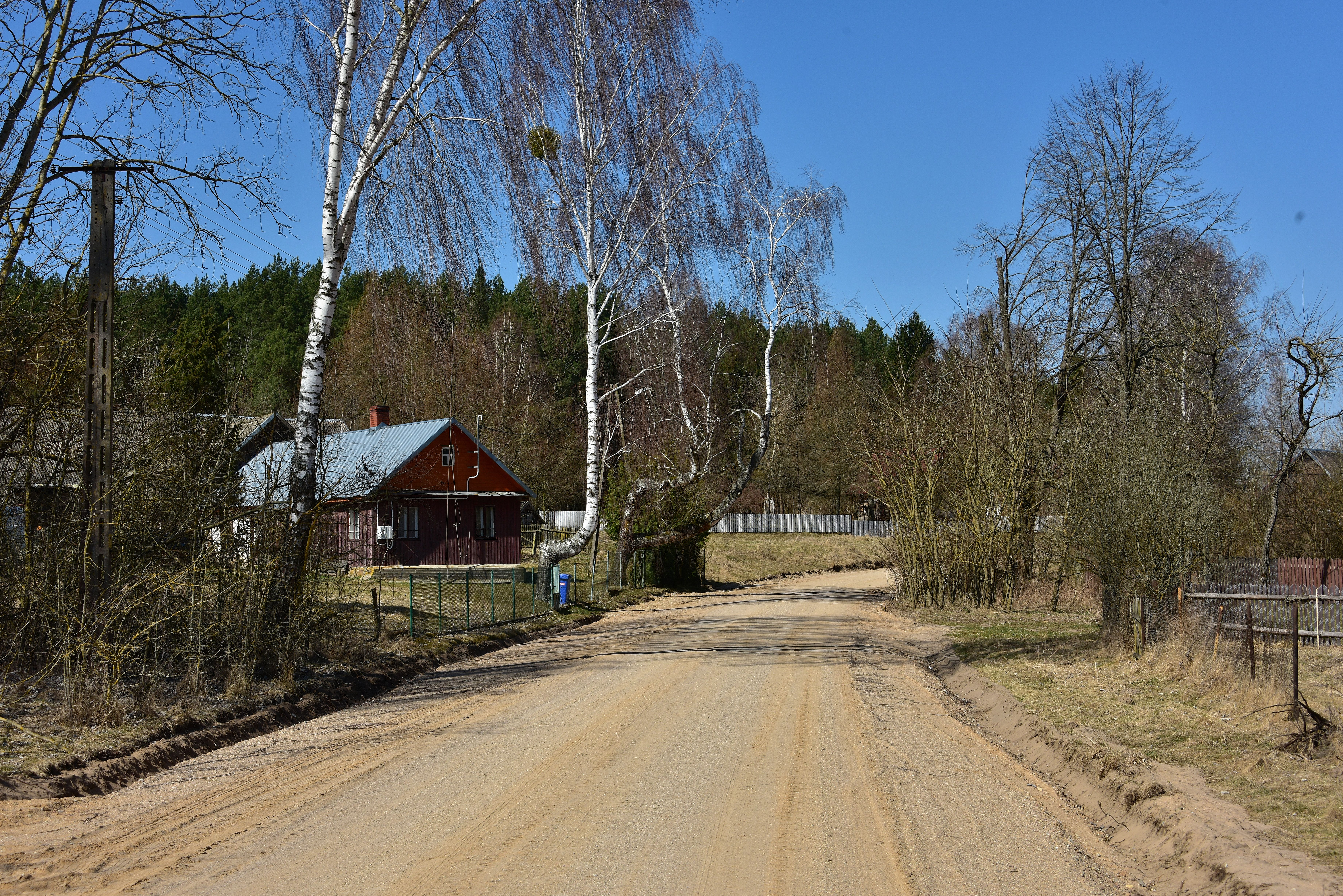 Wieś Białogorce w gminie Krynki, województwo podlaskie